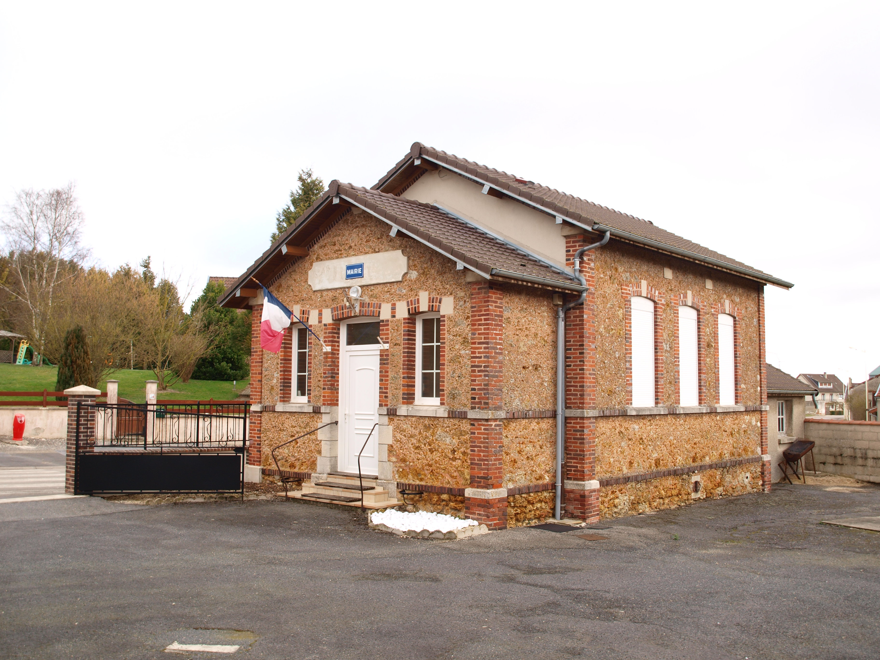 Germinon (Marne, France) ; mairie